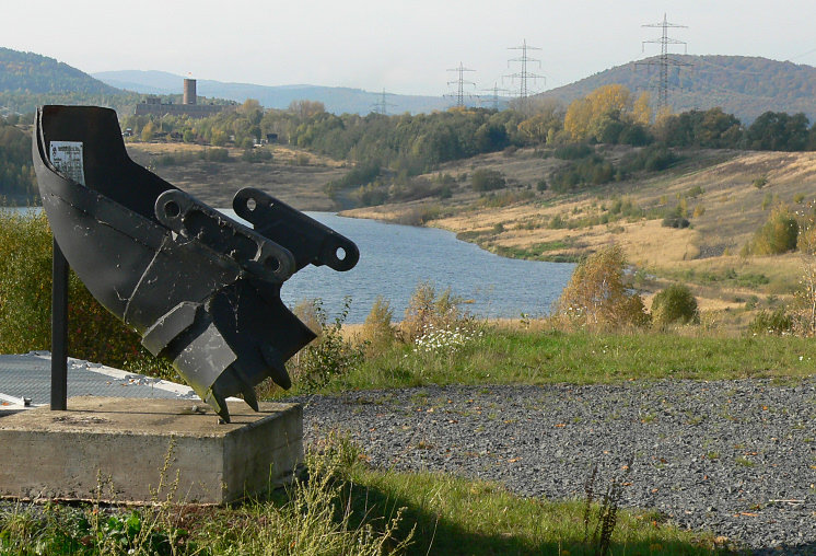 Gombether See, während der Volllaufphase (Sept. 2008)